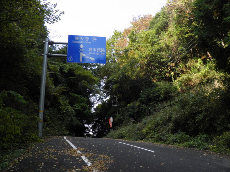 壺坂峠（奈良県高市郡高取町）